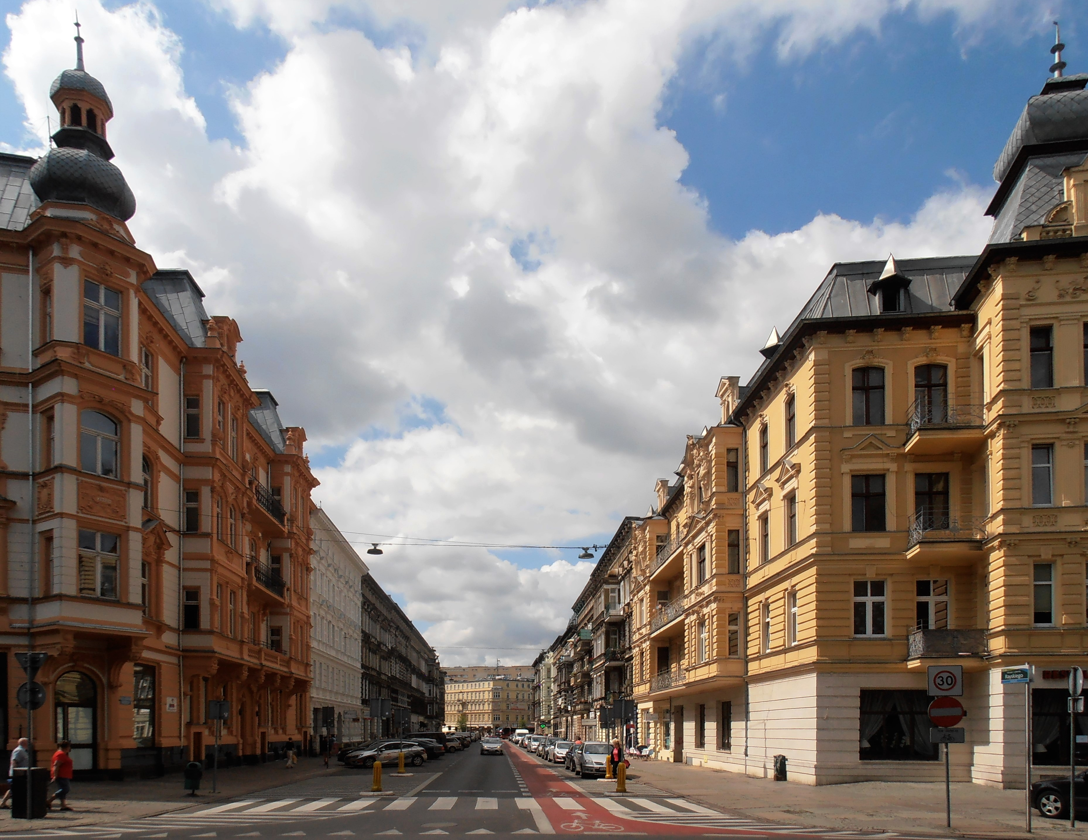 Ulica gen. Ludomiła Rayskiego między pl. Grunwaldzkim a pl. Zamenhofa.